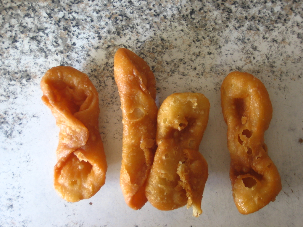 Pestinnos, dulce popular